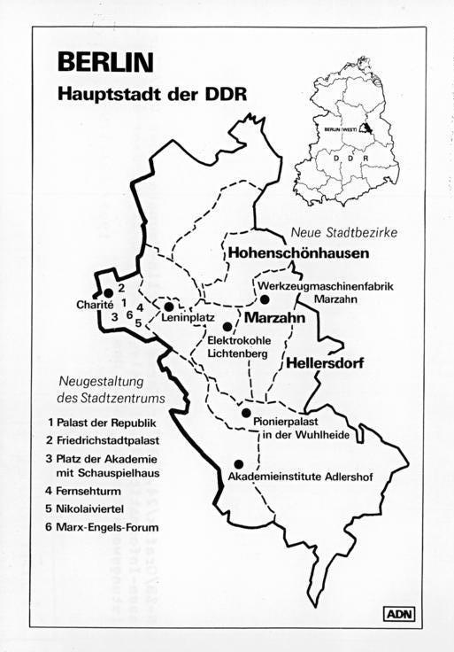 Berlin, Bezirke in Ost-Berlin (Grafik) ADN-ZB Grafik 24.5.89 Karte - Berlin-Hauptstadt der DDR Zur Presse-Information Nr. 61 Beilage; Bezirke im 40. Jahr der DDR - Leistungswachstum zum Wohle des Volkes. Information added by Wikimedia users.